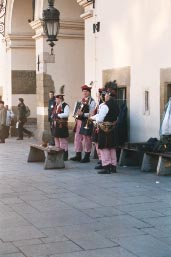 Kapela speelt Poolse volksmuziek voor de Sukiennice (lakenhal) in Kraków. Foto van 22 december 2003